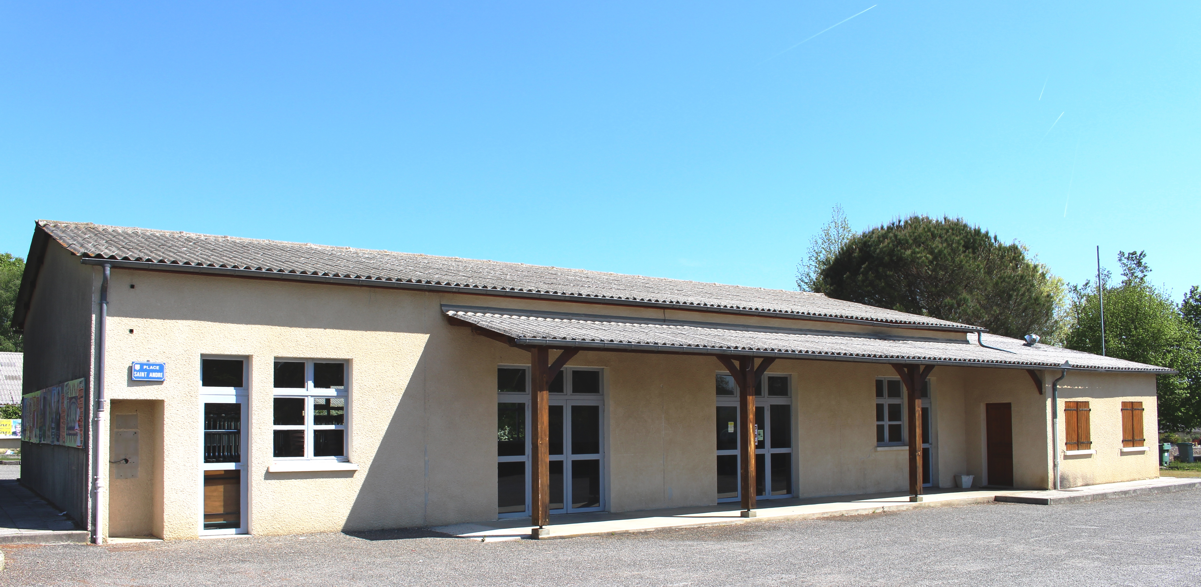 Salle des fêtes de Lansac (Hautes-Pyrénées)